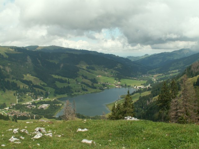 Black lake (English), Schwarzsee (German), Lac Noir (French). Located in the canton of Freiburg, Switzerland. Blick vom Höhenweg auf den Schwarzsee.